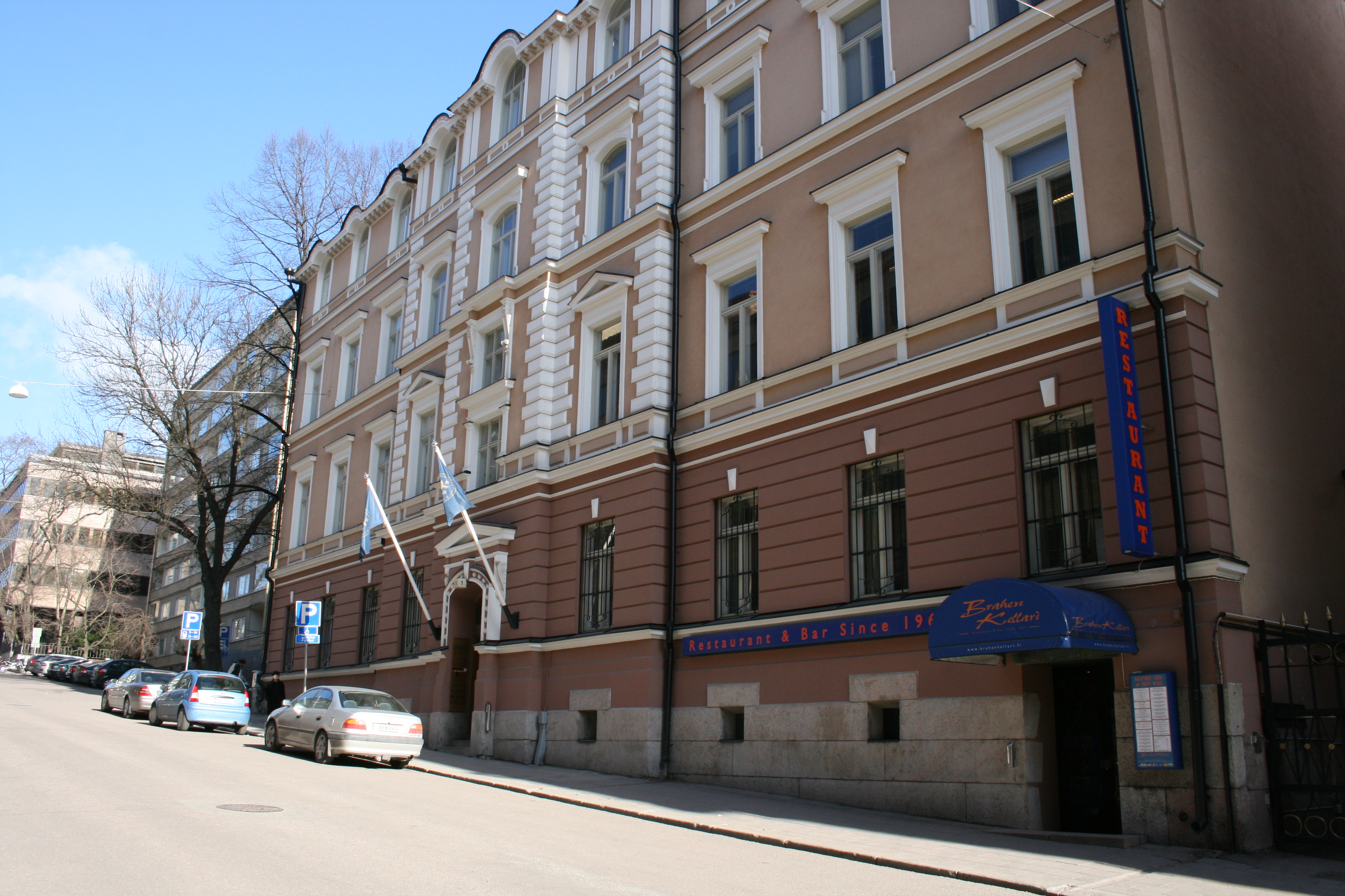 Turun kauppakamari